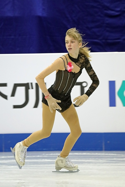 Alexandra Feigin at the Junior World Championships 2017